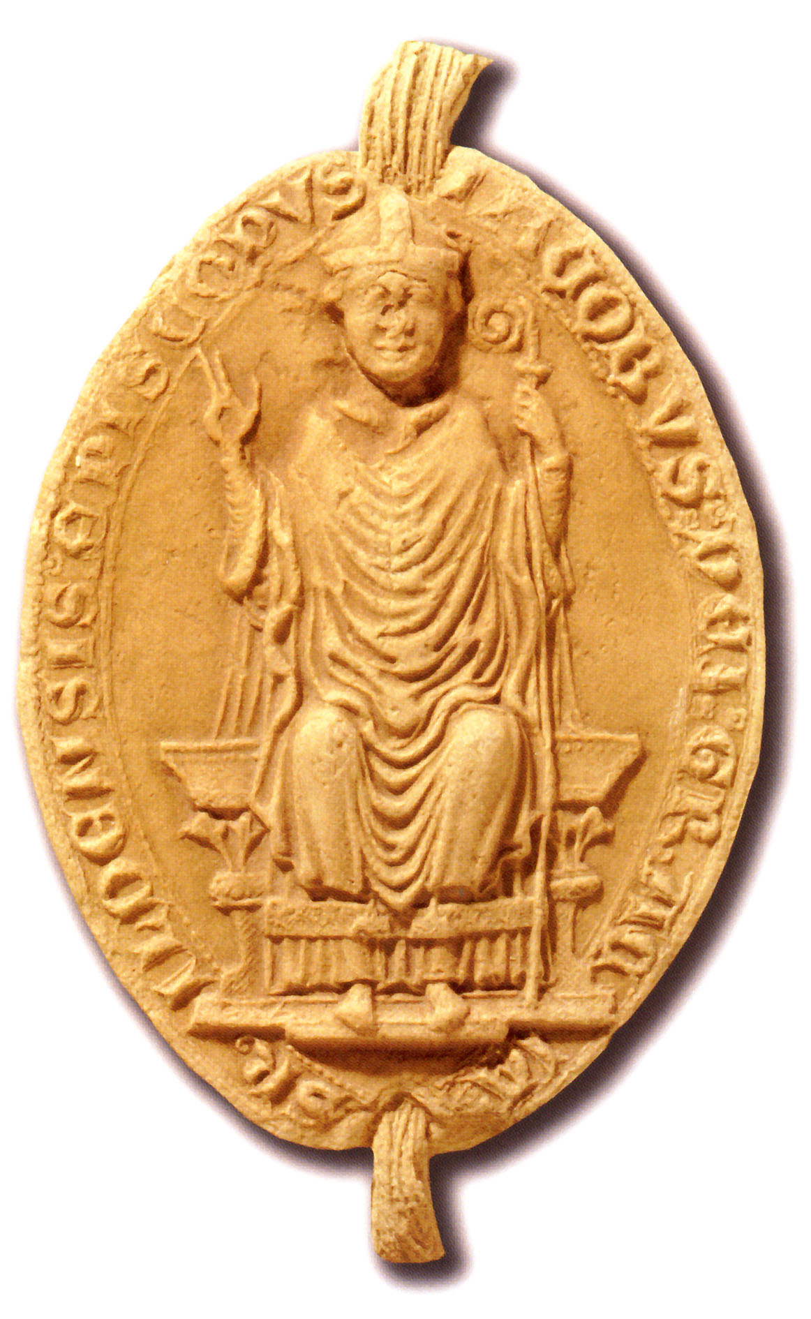 Archbishop Jacob Erlandsens seal 1200s